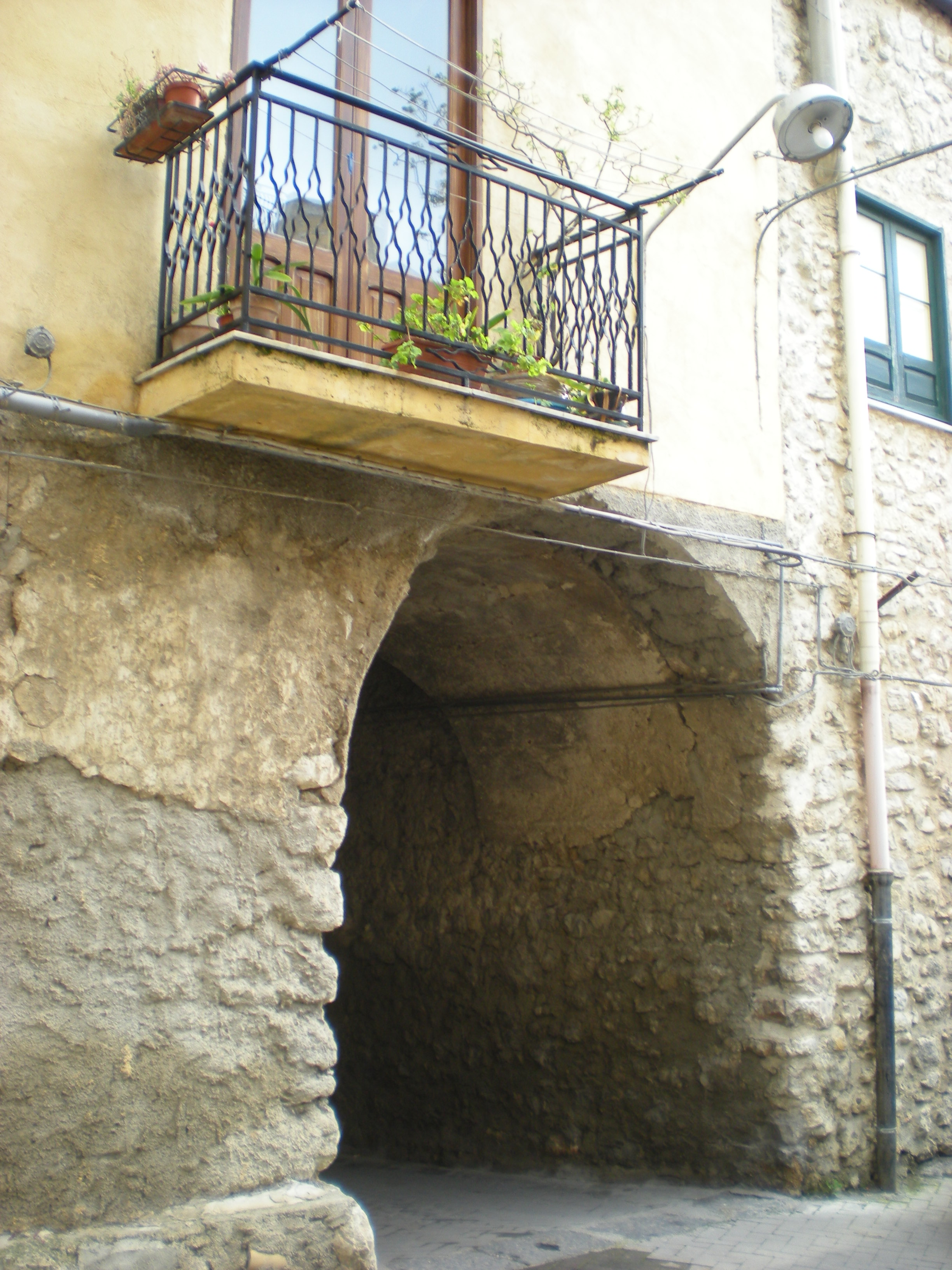 Xanèa